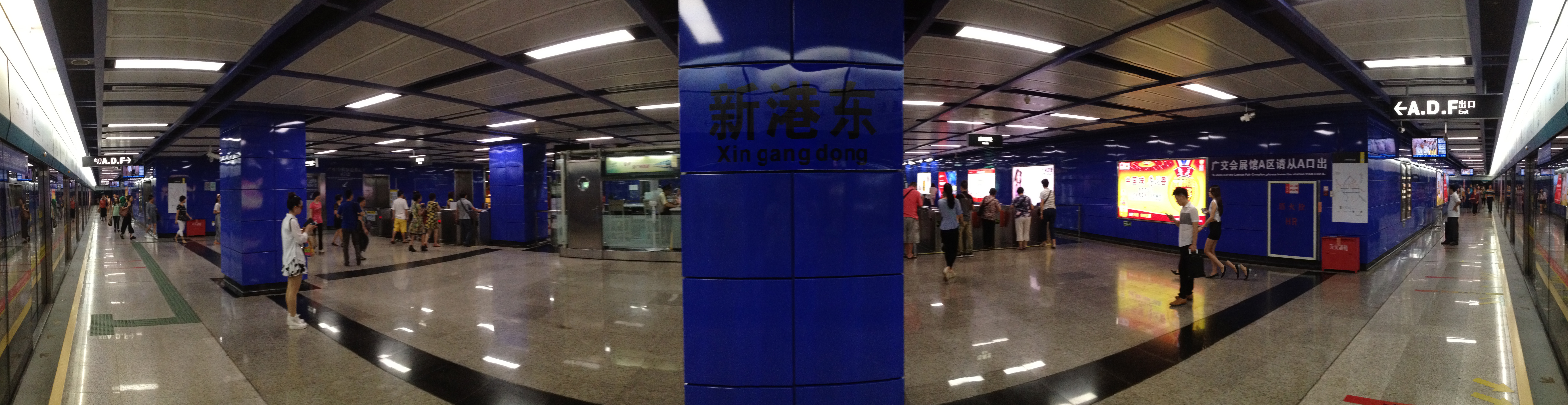 广州地铁新港东站月台全景图